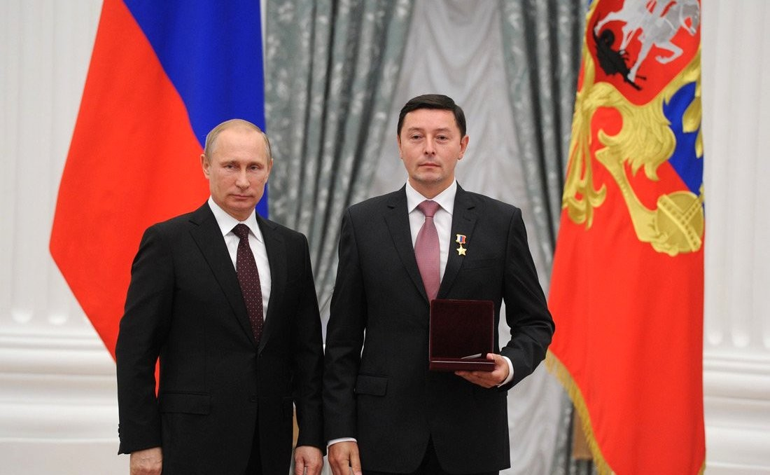 Звание Героя Российской Федерации и почётное звание Летчик-космонавт Российской Федерации присвоено Сергею Ревину